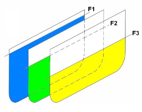 Área de la sección maestra EN: midship section surface.